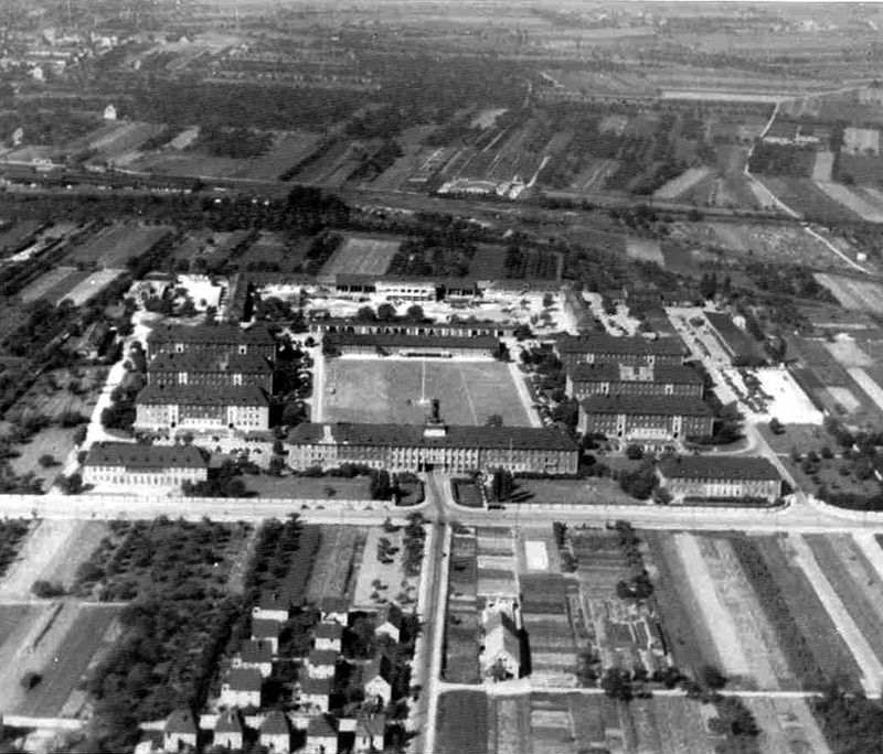 Campbell Barracks (frühere Großdeutschland Kaserne) in Heidelberg. Sitz von USAREUR